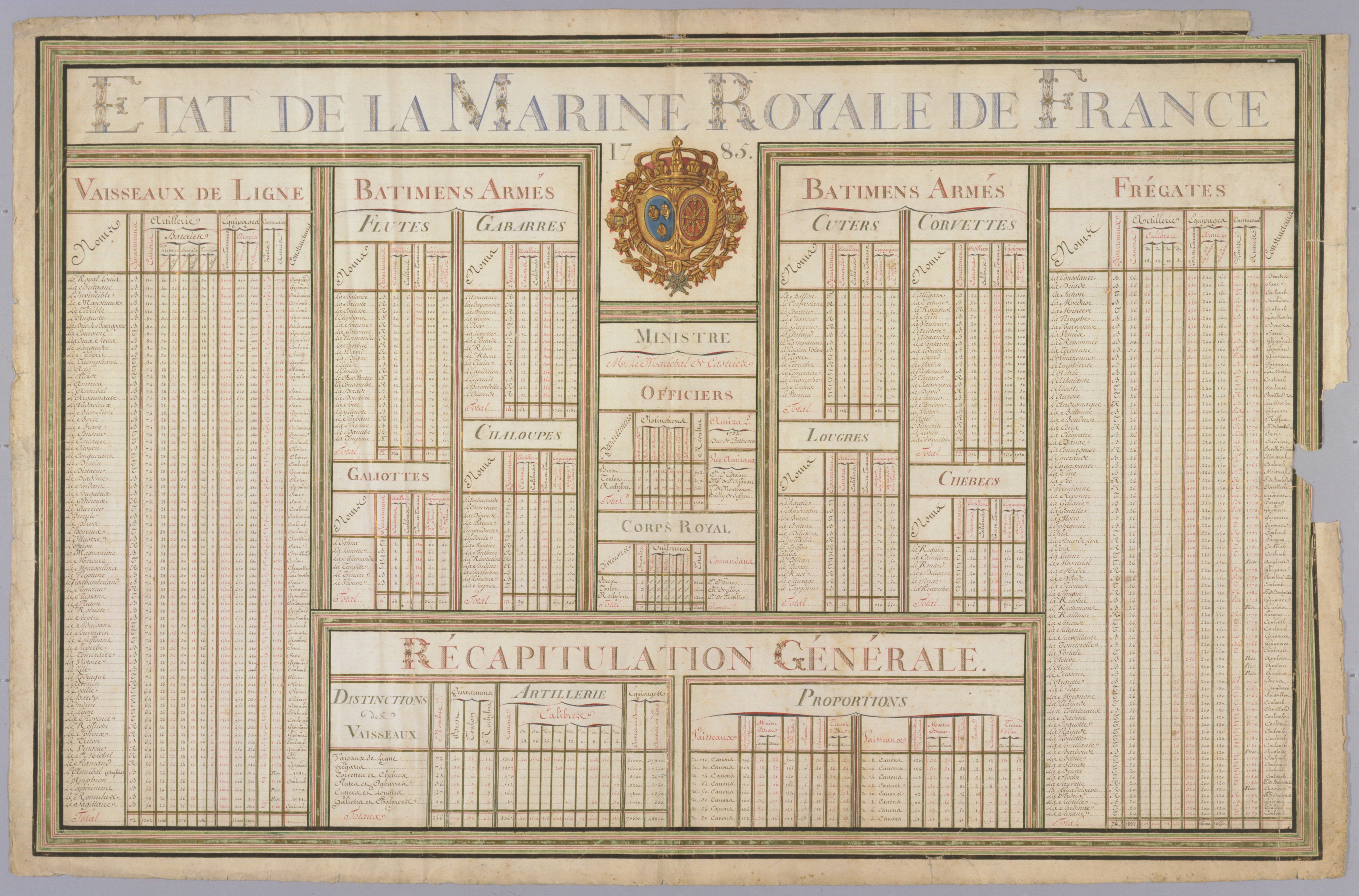 Etat_de_la_Marine_royale_de_France,_1785